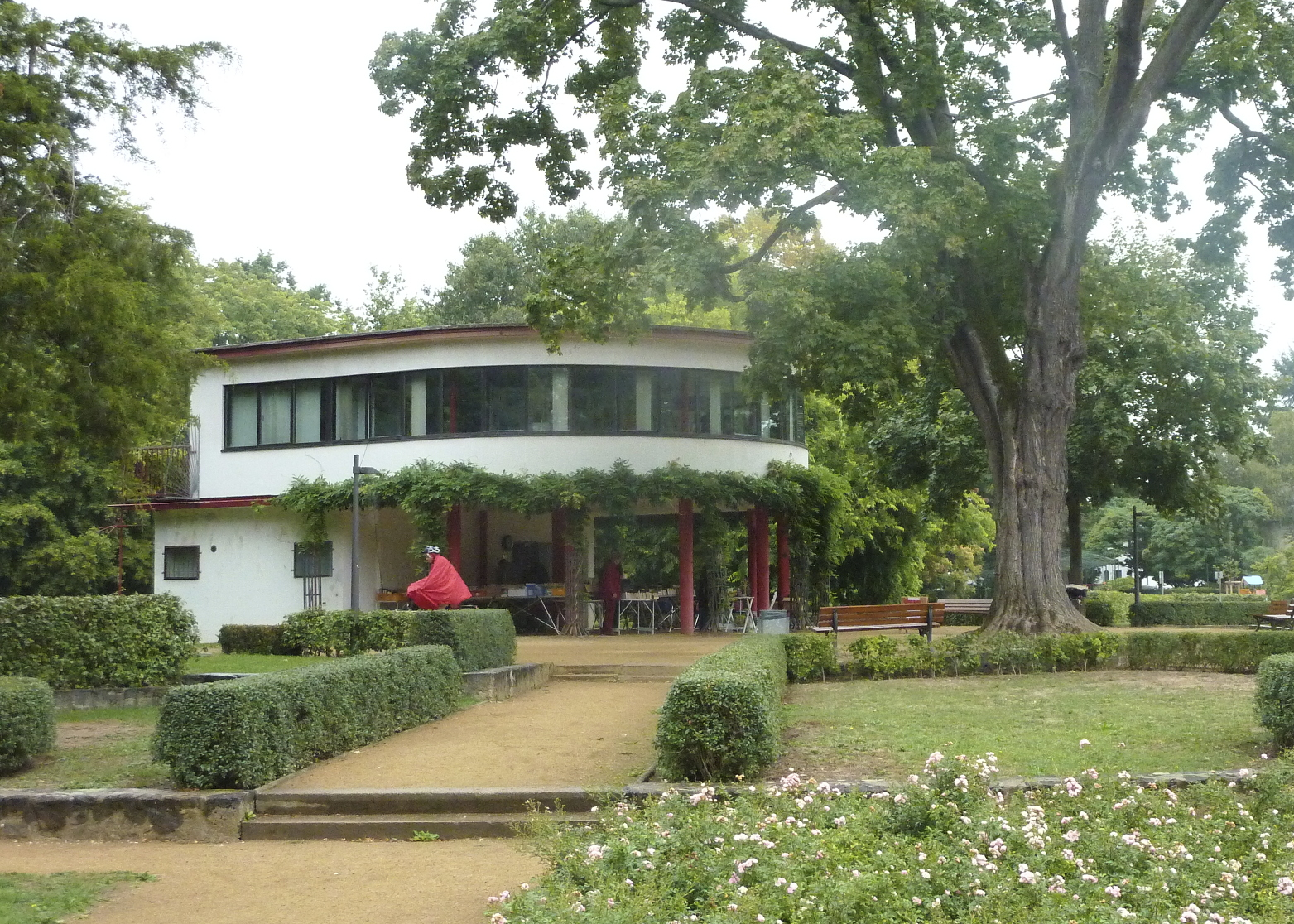 Frankfurt am Main, Stadtteil Rödelheim: Der im Jahr 1931 fertiggestellte ehemalige Unterrichtspavillon des Schulgartens im Brentanopark, gestaltet im Stil der klassischen Moderne. Architekt: Eugen Carl Kaufmann (1892–1984).